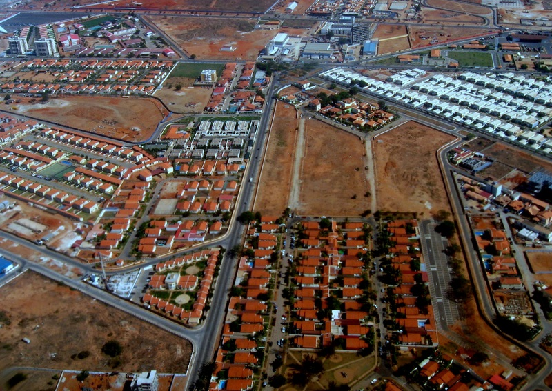 New suburb (new housing area) in Luanda, Angola (2010)